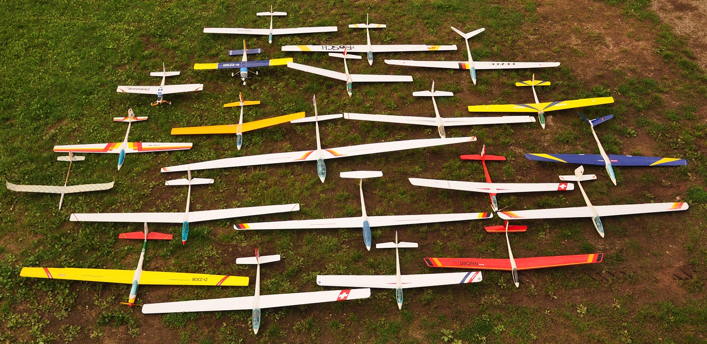 Carrera-Flugmodelle-alle